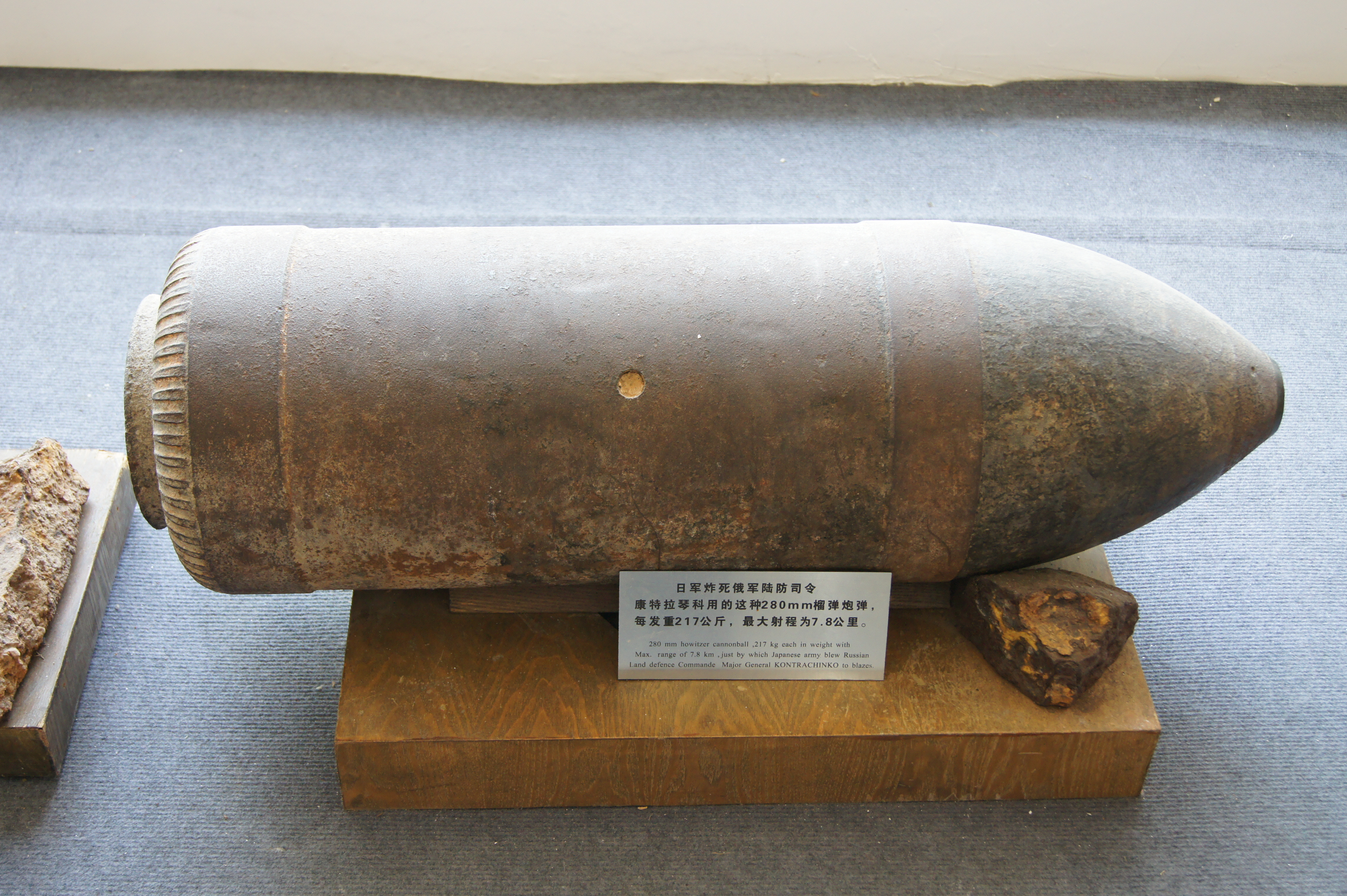 二十八糎砲の砲弾（旅順日露戦争陳列館に展示されている物を撮影）